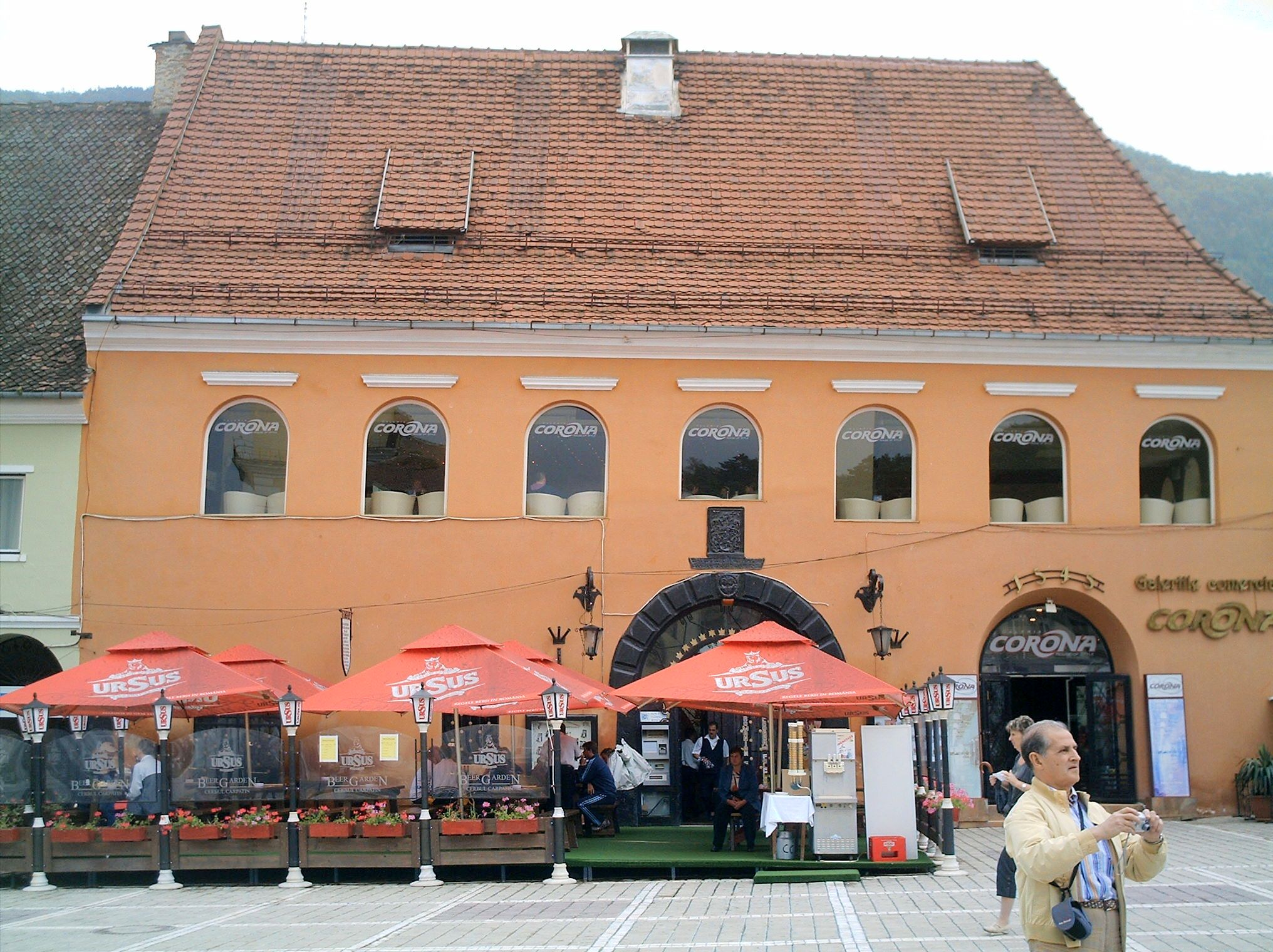 Casa Negustorilor/Cerbul Carpatin